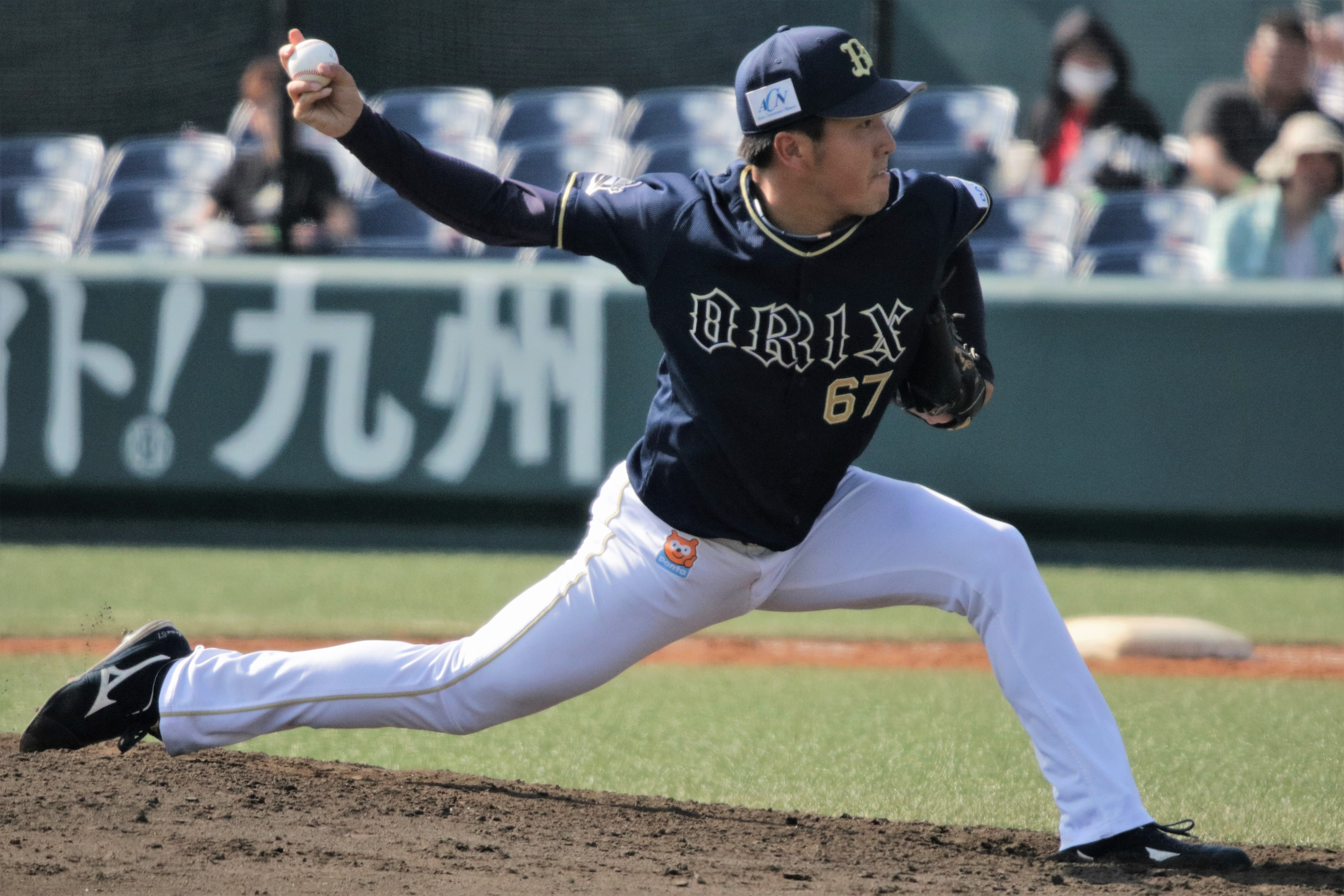 2018/4/20 タマホームスタジアム筑後